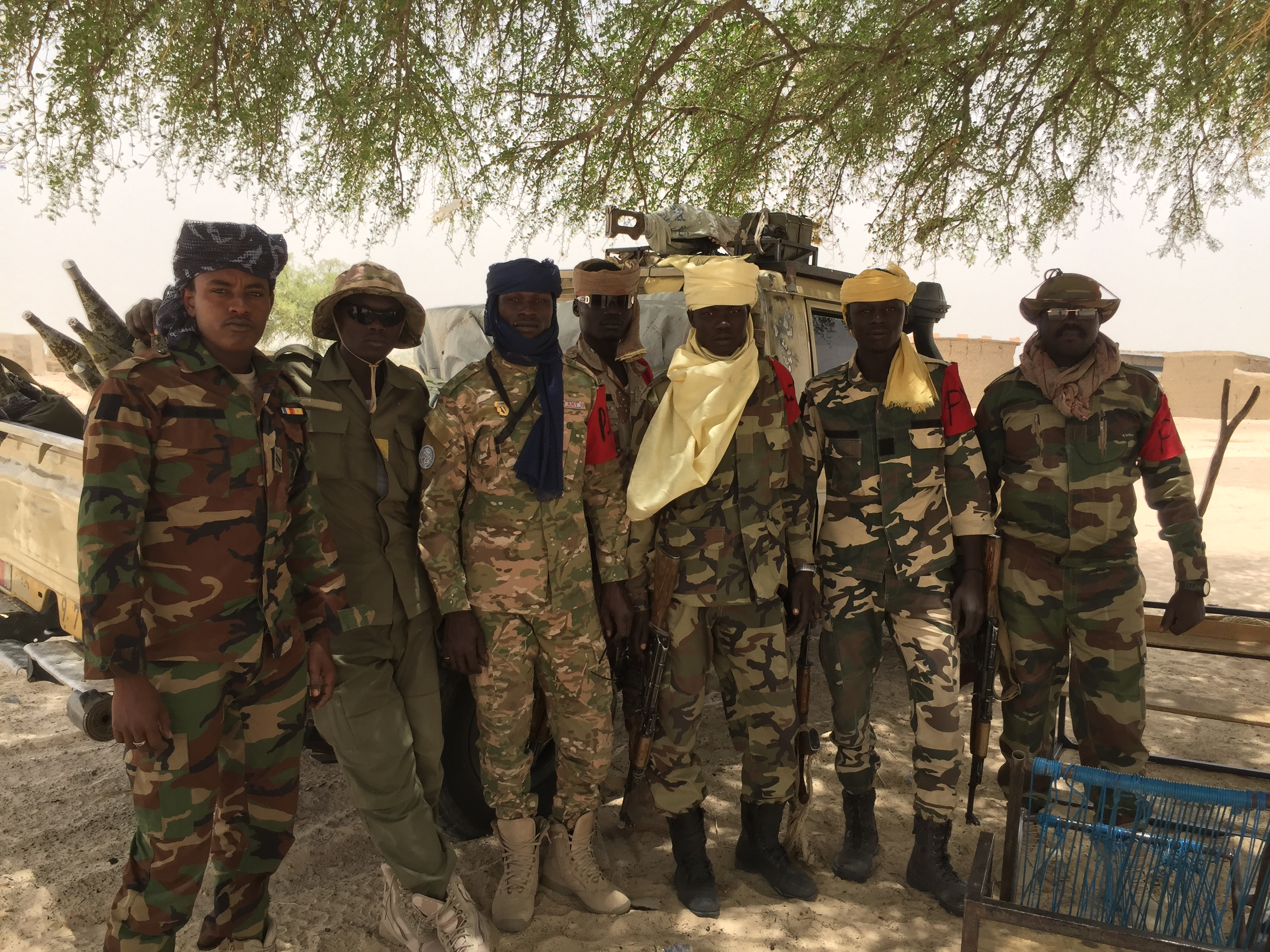 Des militaires tchadiens posent pour VOA Afrique devant l'école de Bosso dans la région de Diffa, Niger, le 19 avril 2017 (VOA/Nicolas Pinault)